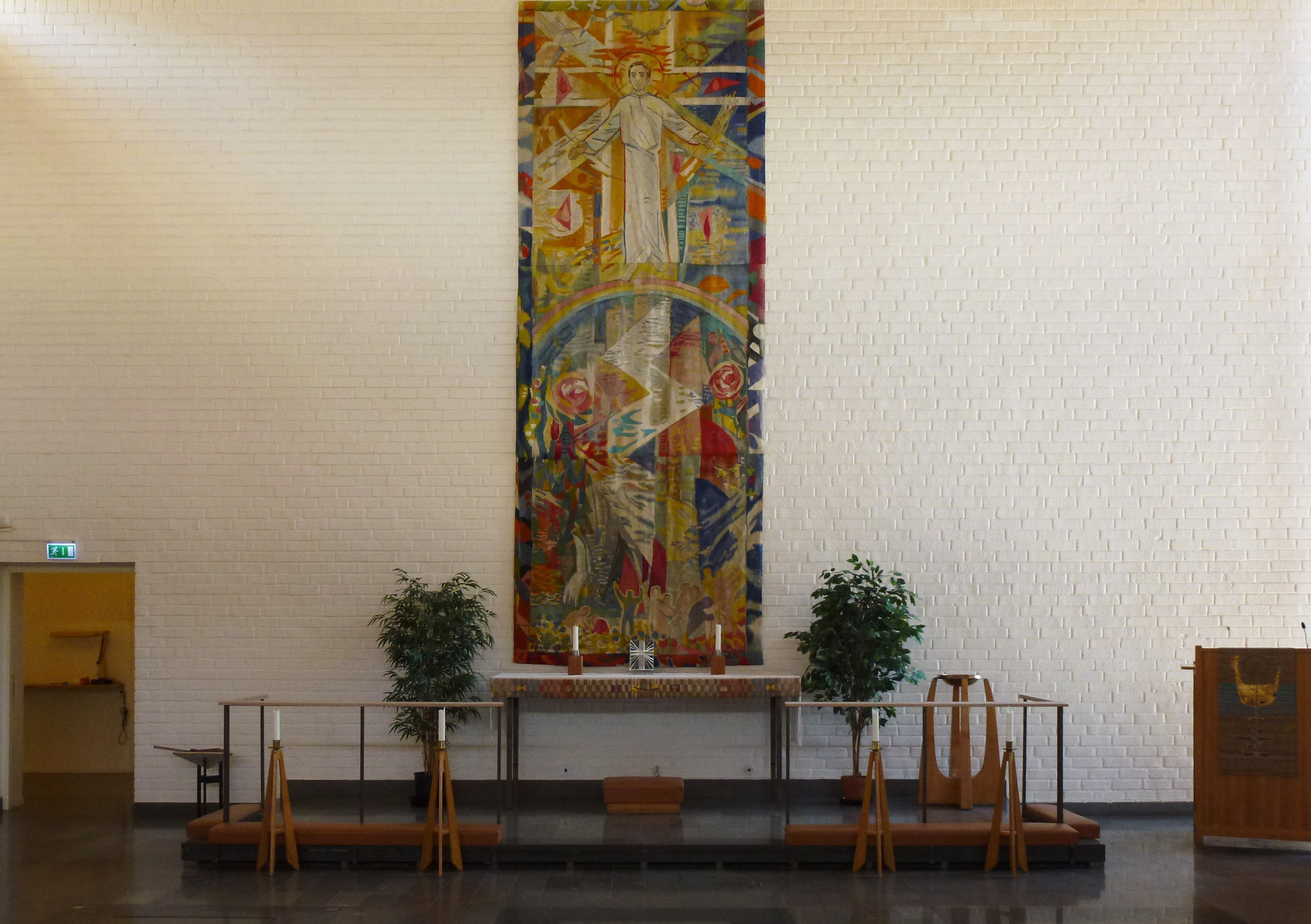 S:t Botvids kapell stora kapellet